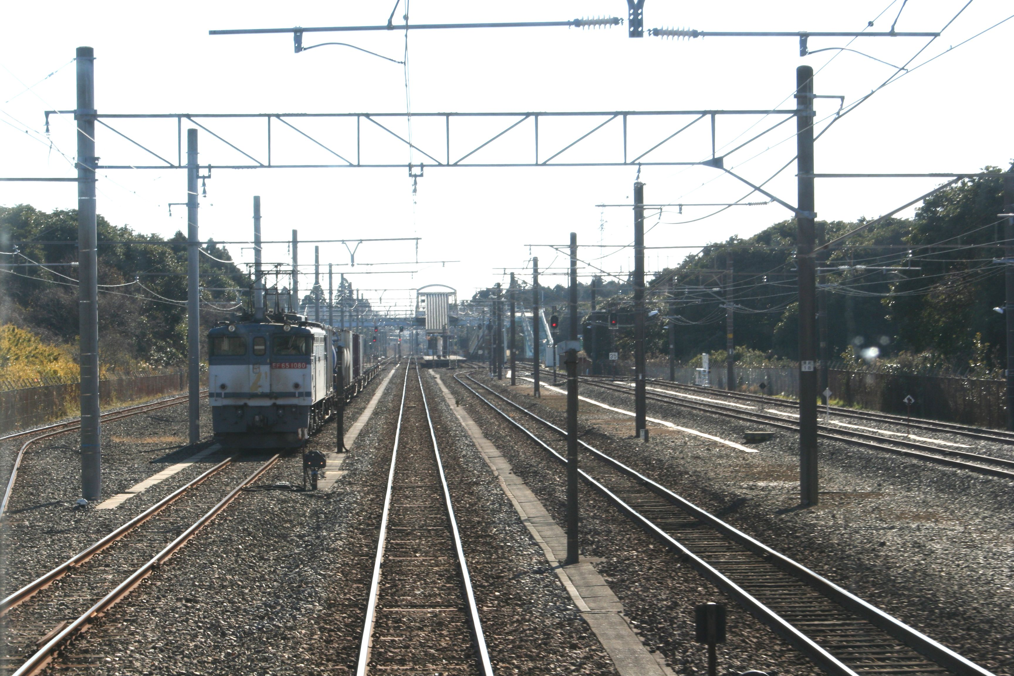 鹿島サッカースタジアム駅構内